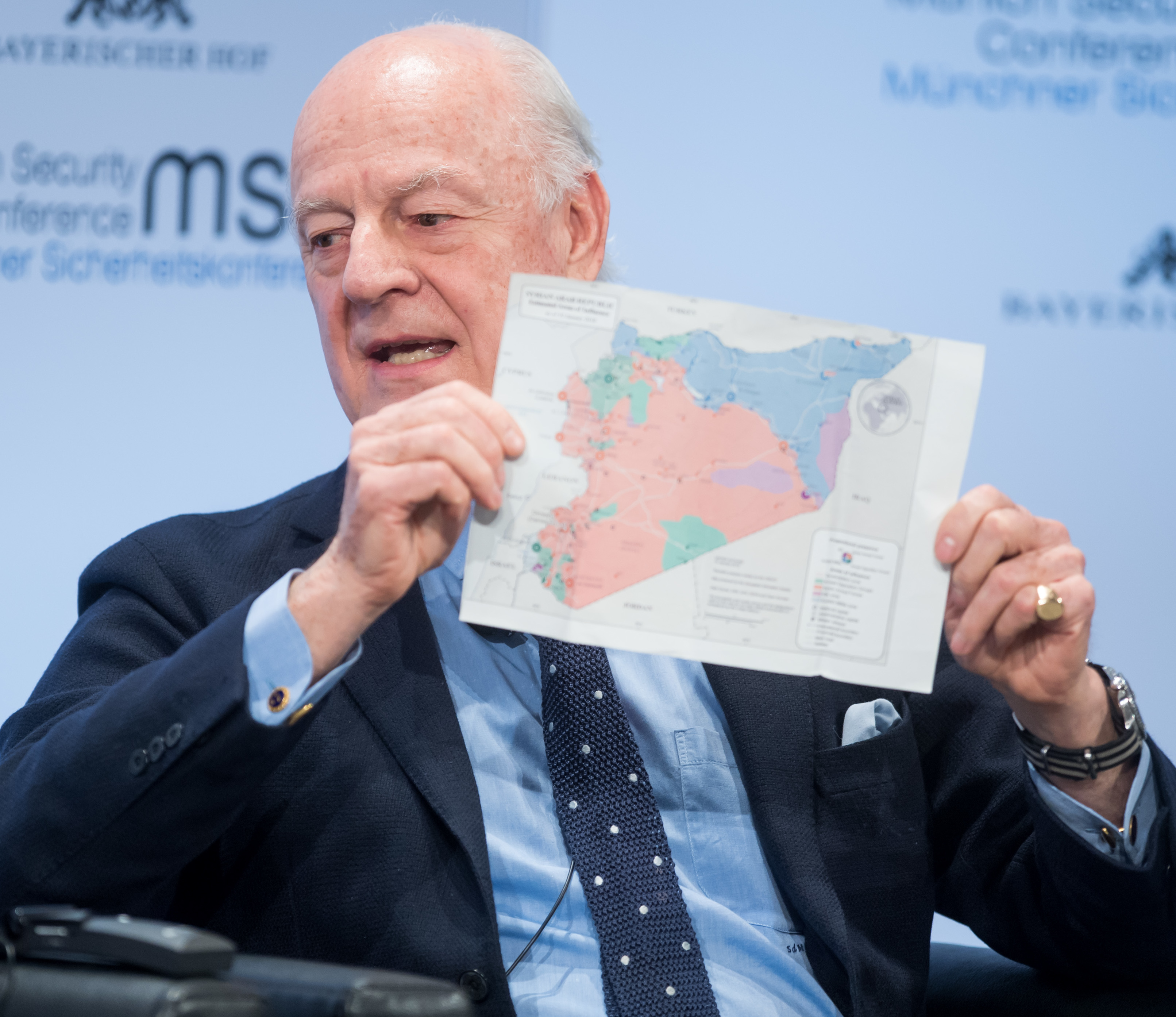 Staffan de Mistura während der Münchener Sicherheitskonferenz 2018